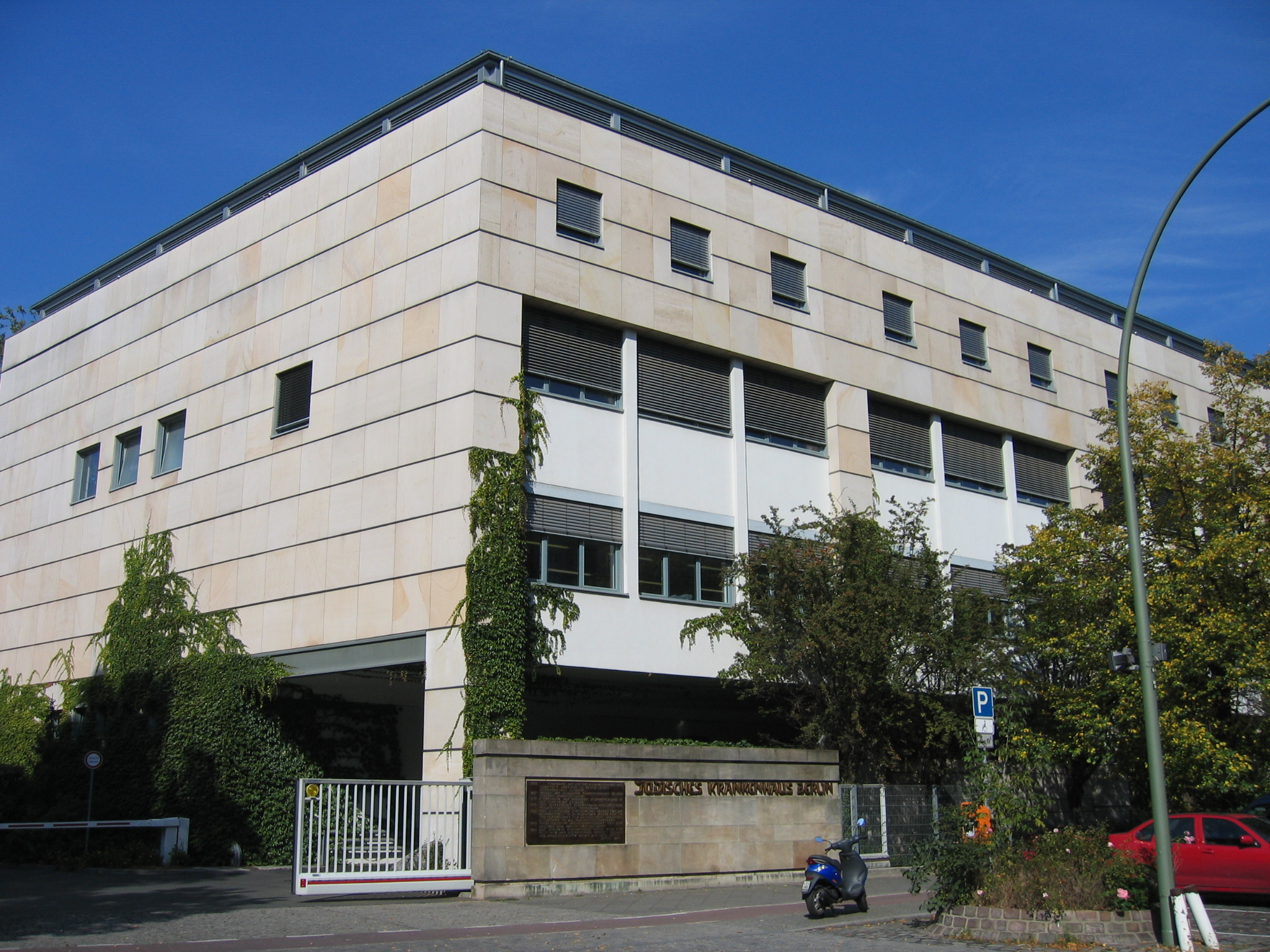 Jüdisches Krankenhaus Berlin, Fassade zur H.-Galinski-Str.